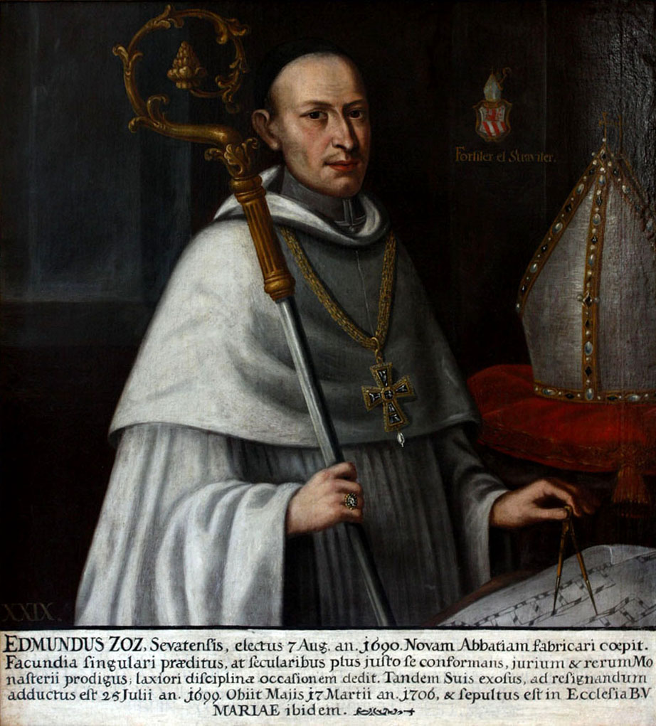 Edmund Zoz, 29. Abt von Stift Stams (1690-1699)